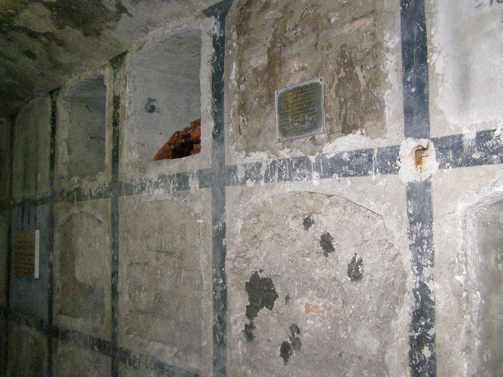 Hrobové miesta v krypte katedrály